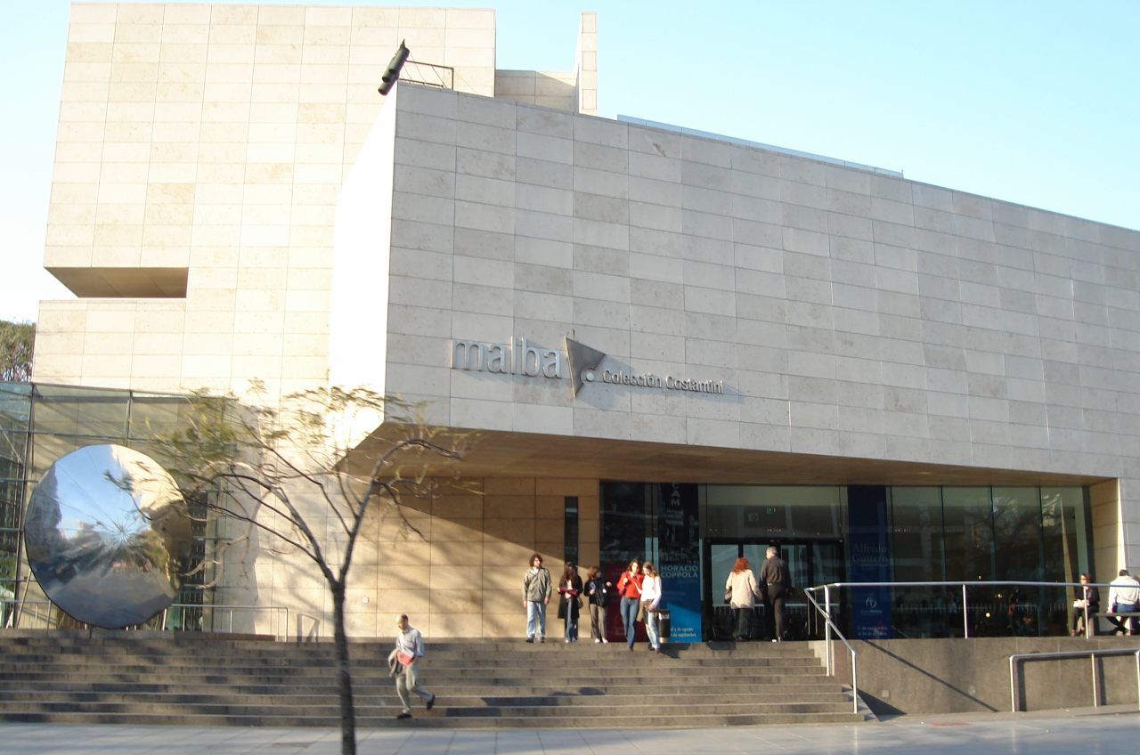 Museo de Arte Latinoamericano de Buenos Aires (MALBA).